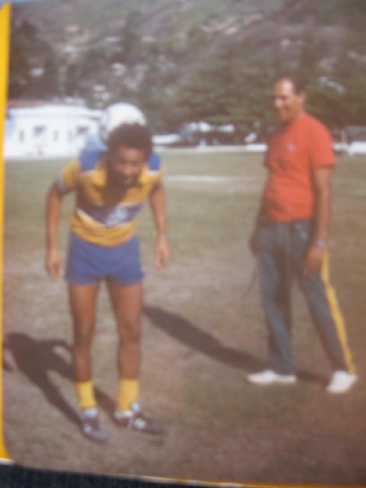 Marcos André, ex-atleta do Cruzeiro de Niterói.